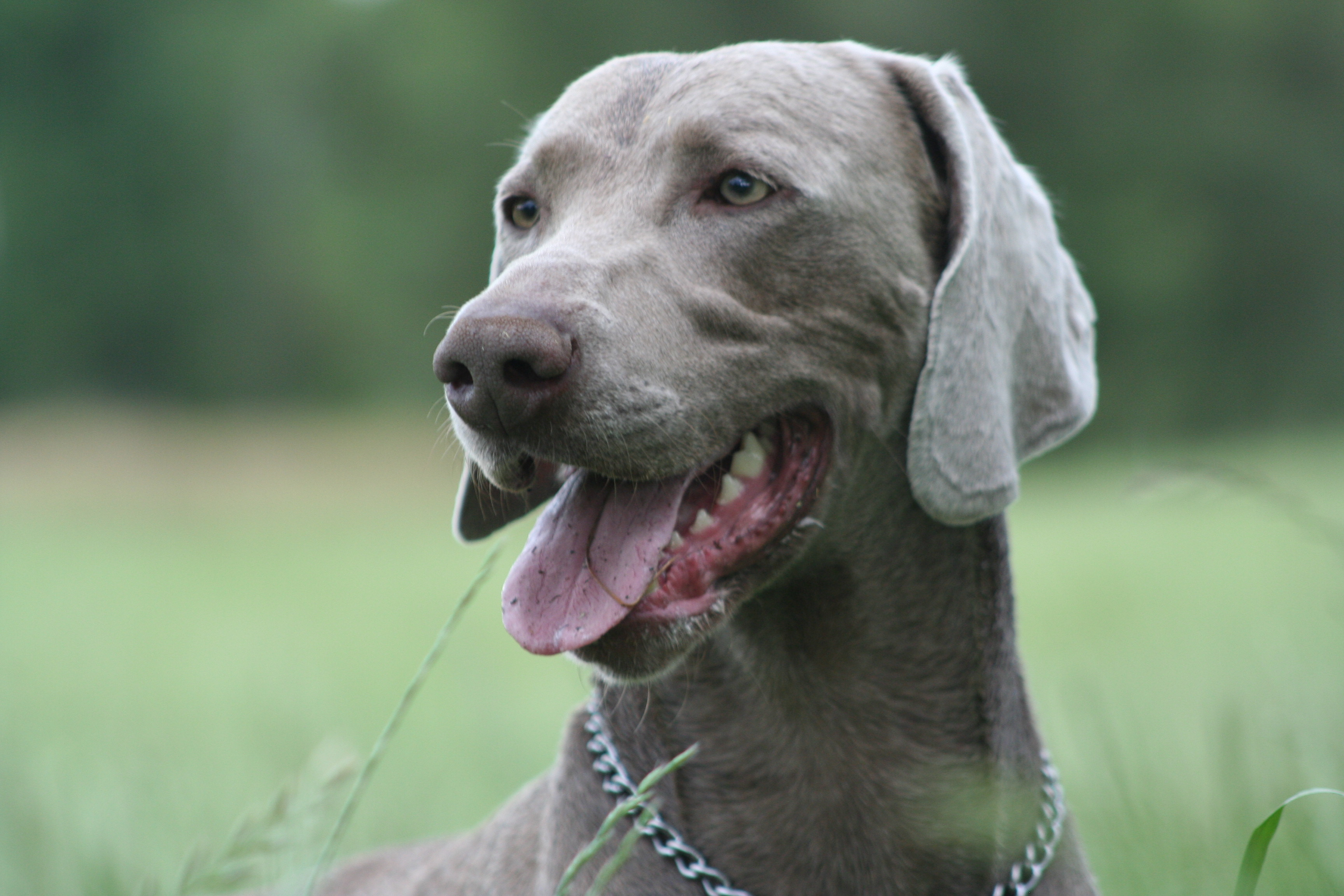 Fotografía de mi braco de Weimar, Angus.